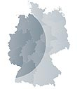 Western Germany, West Germany, Westdeutschland